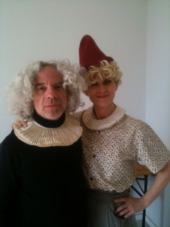 Sophie Rois und Martin Wuttke im Kostüm zur Castorf Inszenierung DER GEIZIGE an der Volksbühne Berlin